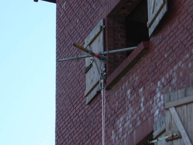 Deltaausleger